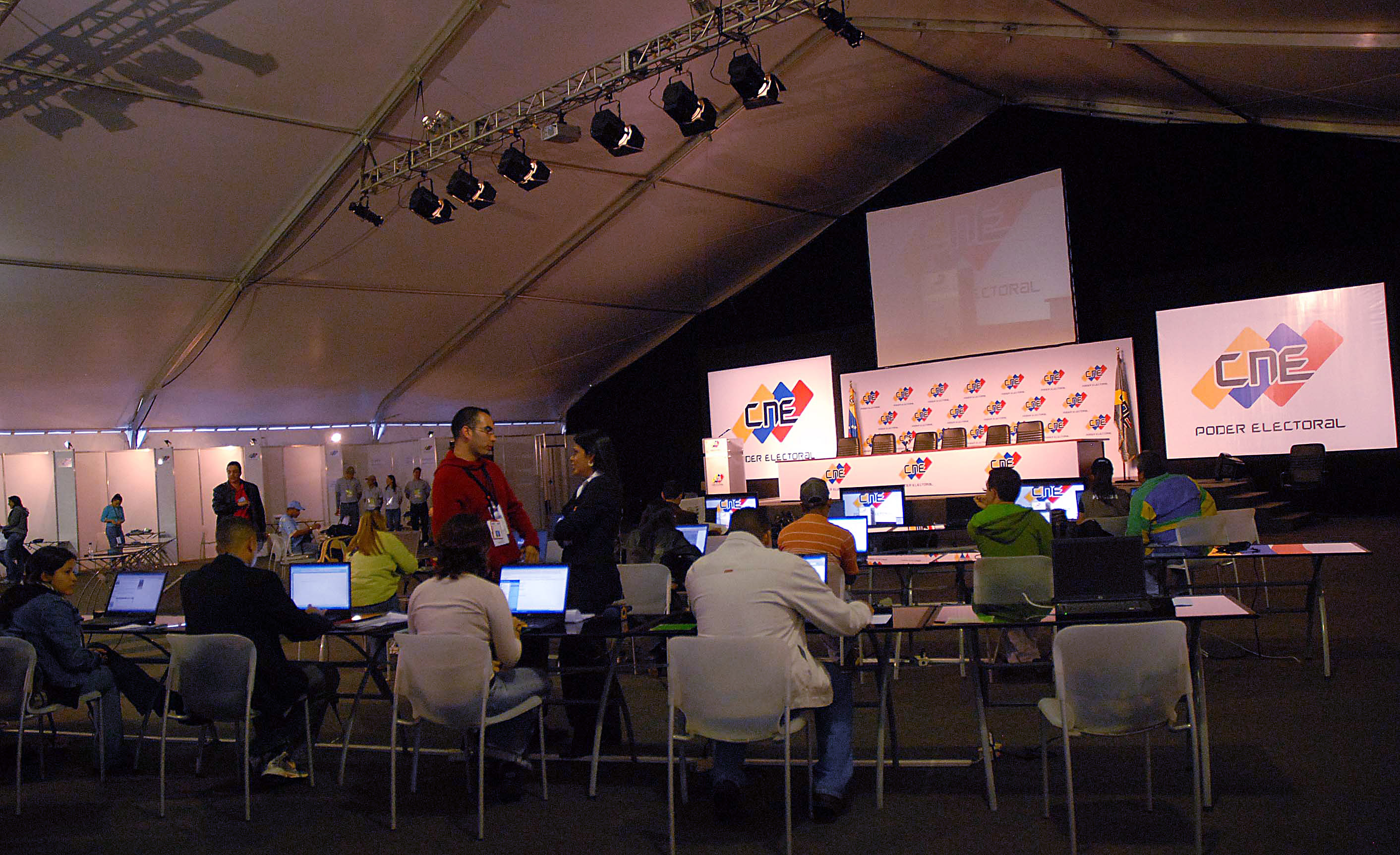 Preparativos para apuração do resultado do referendo sobre a reforma constitucional na Venezuela.